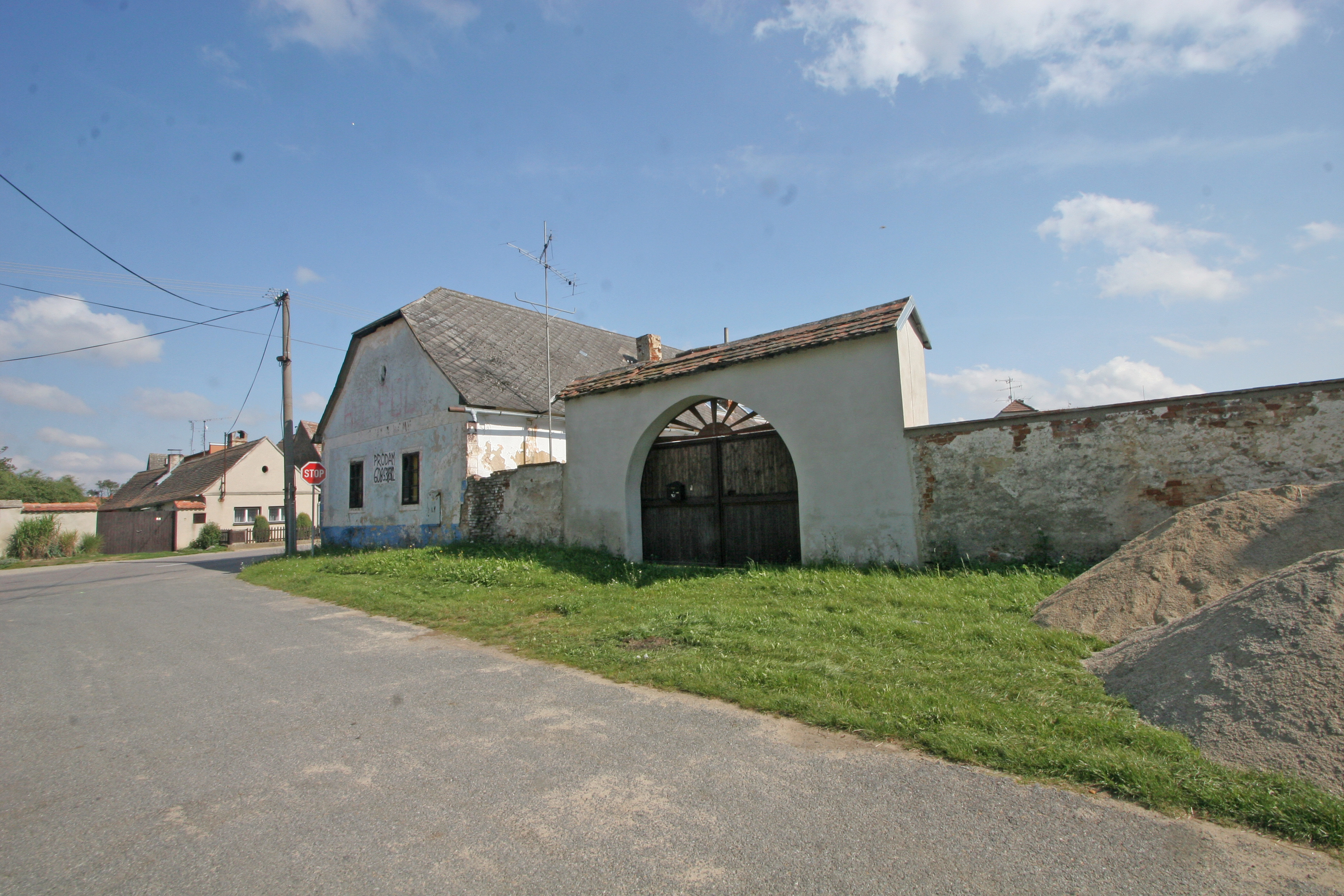 Zálesí čp. 32